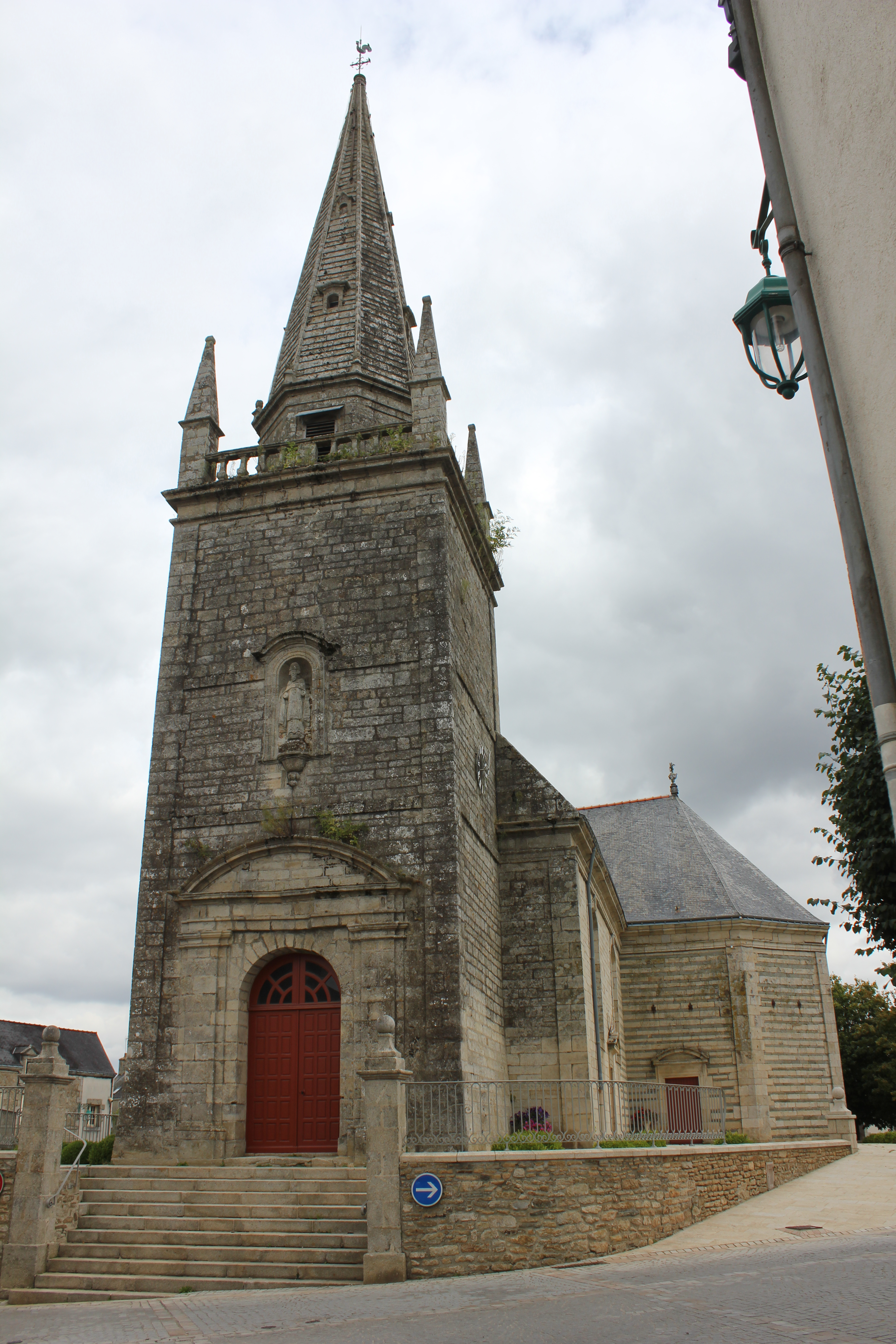 Église Saint-Cyr